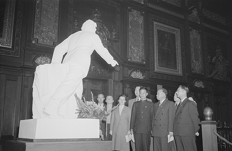 Original image description from the Deutsche FotothekChinesische Delegierte im Plenarsaal des Reichgerichtes (heutiges Bundesverwaltungsgericht)